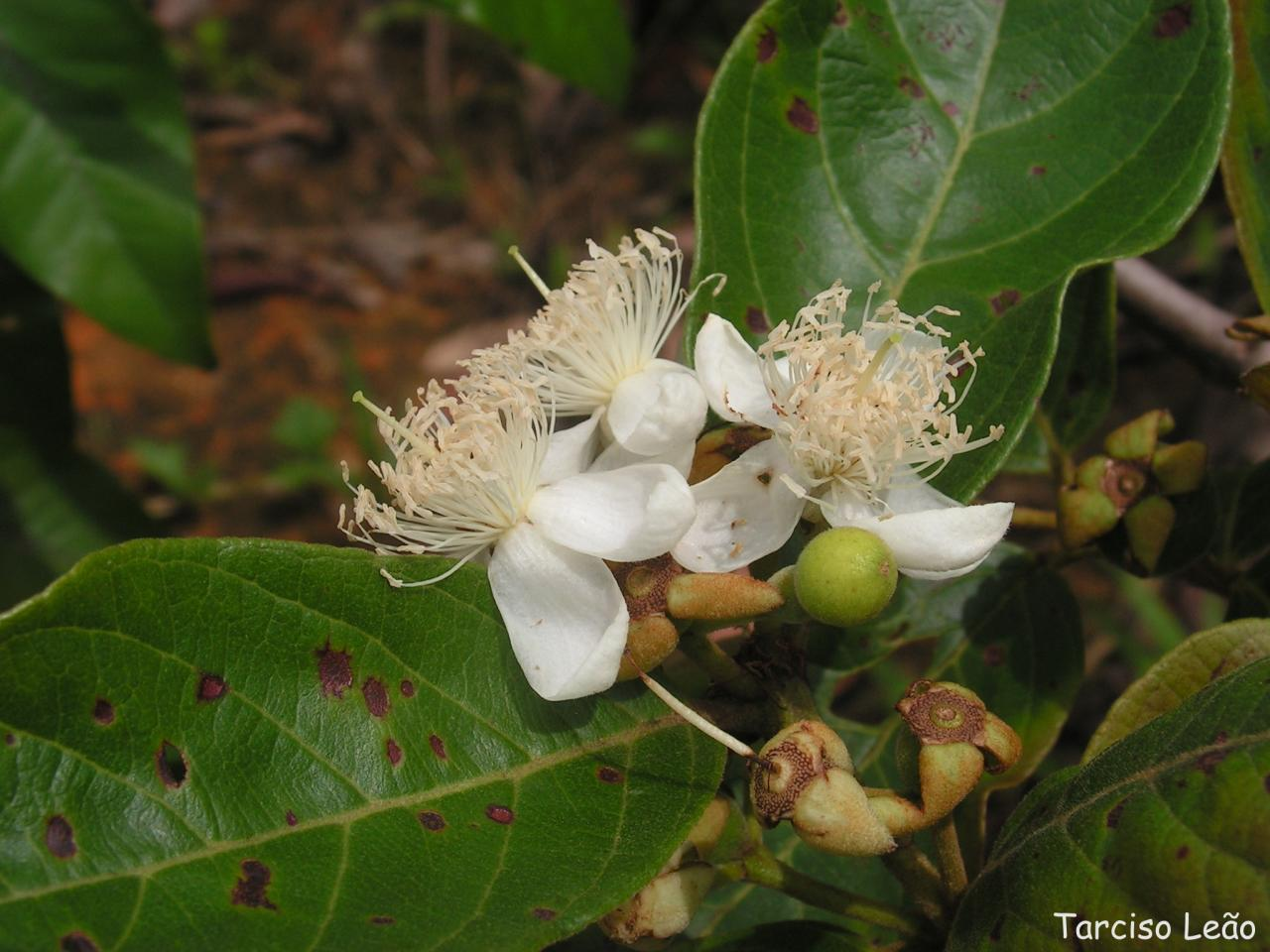 Arbusto ou arvoreta super pioneiro, com capacidade de colonizar terrenos muito degradados